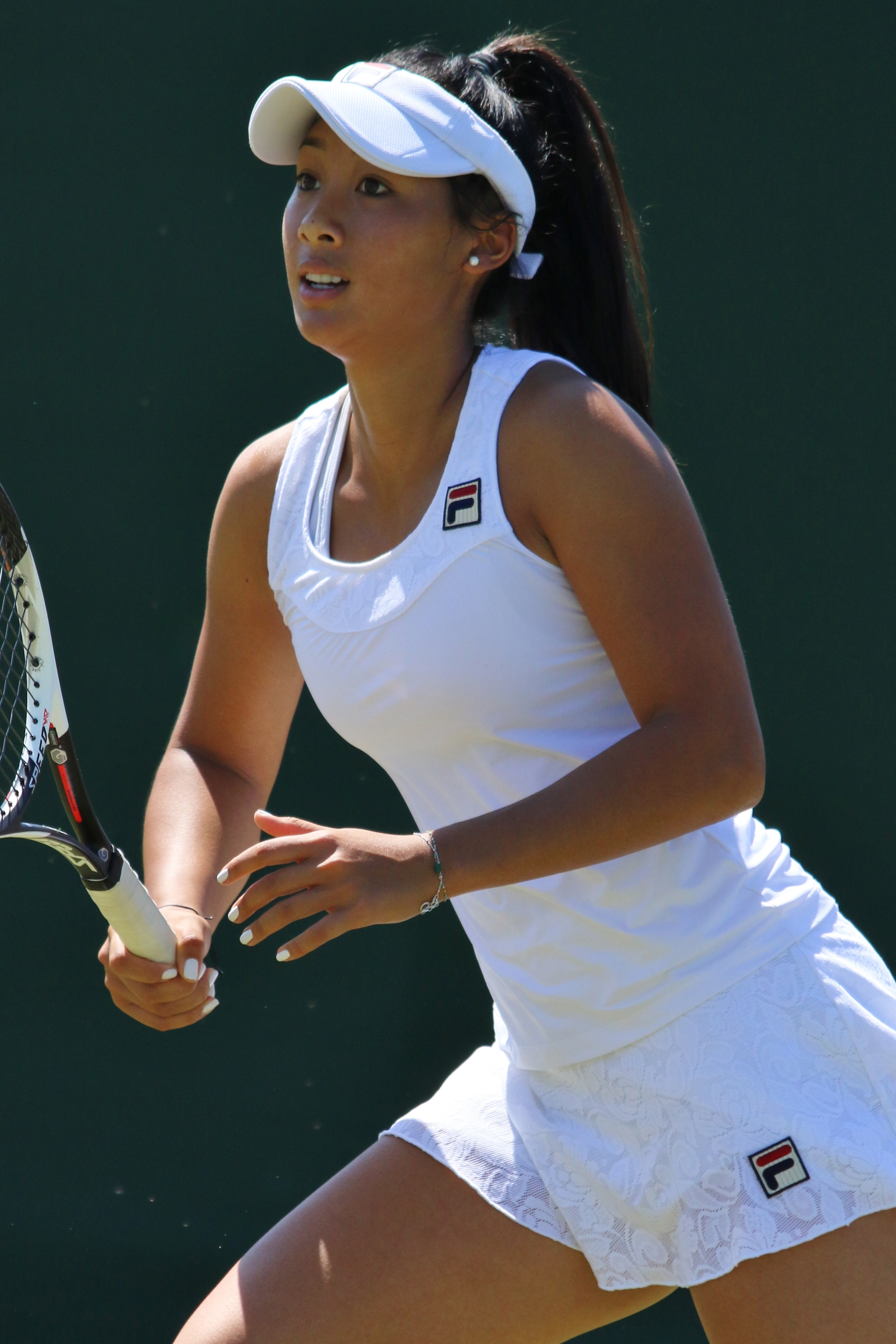 Hon WMQ18 (25)